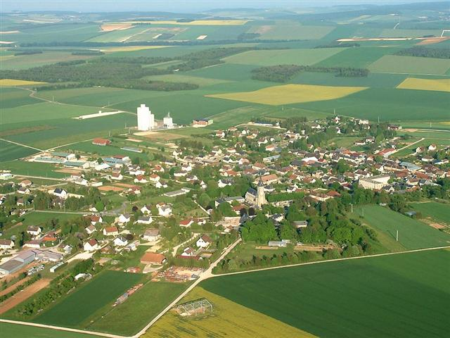 Vue aérienne de Mesnil Saint Loup